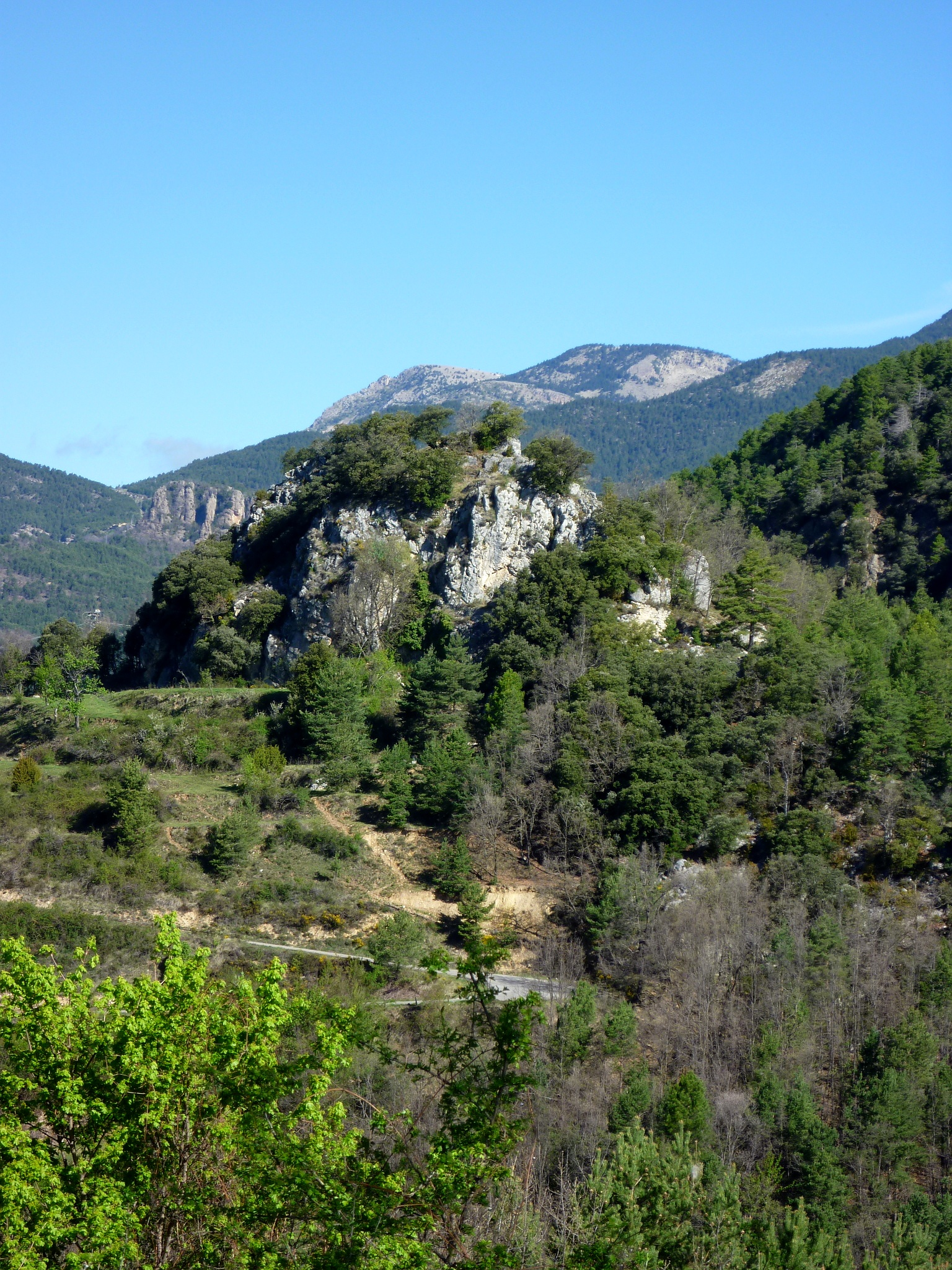 Serrat del Castell de Sisquer. Al cim es troben unes restes del mateix.